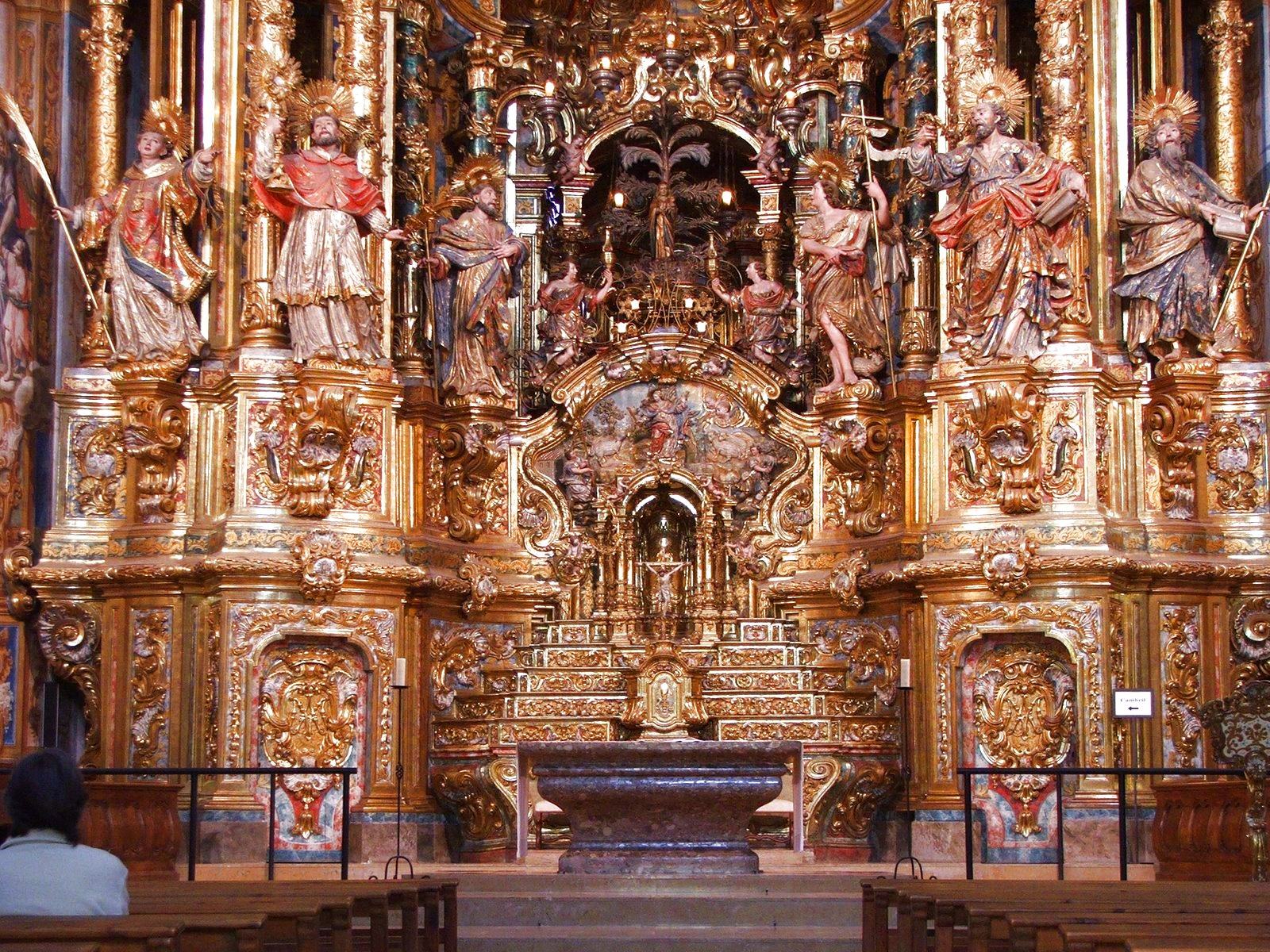 Santuari del Miracle (Riner, Solsonès) - Església - Retaule barroc: Altar i part baixa del retaule